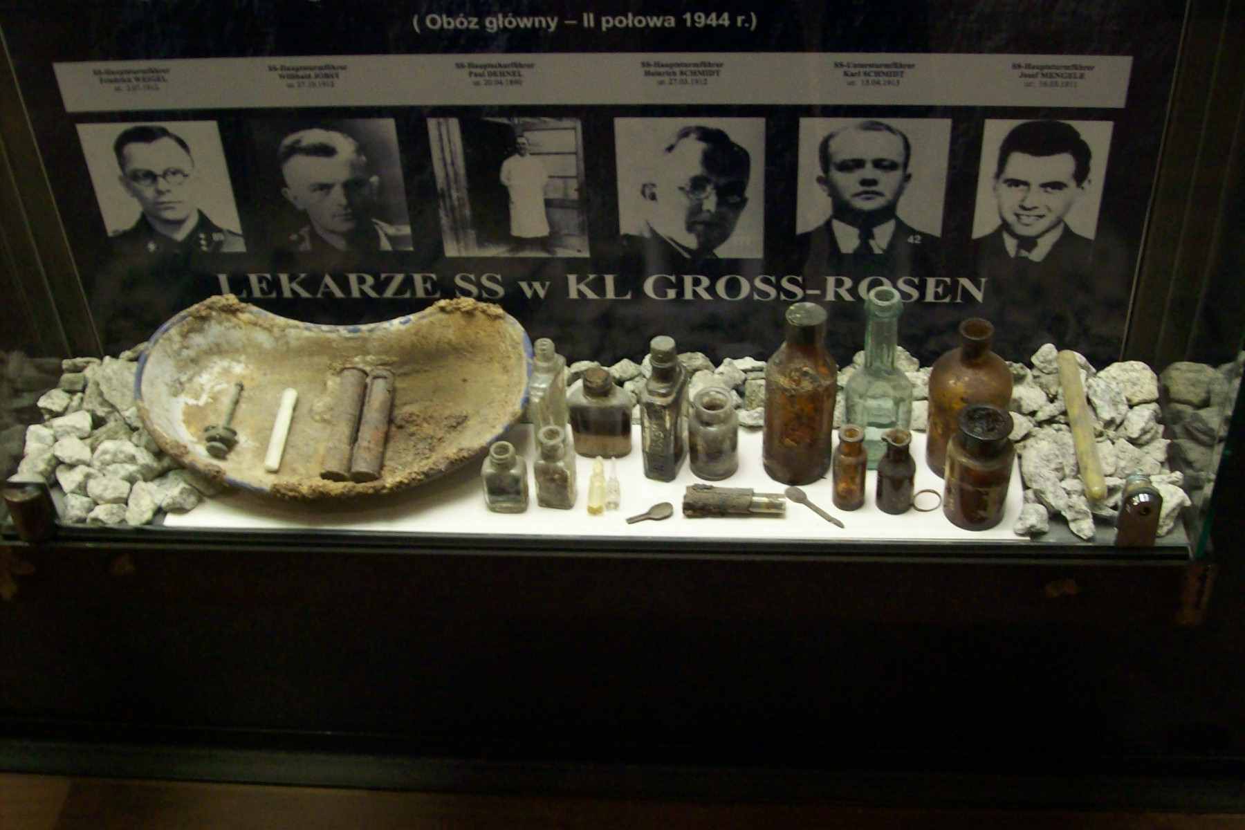 Eksponaty znajdujące się w muzeum KL Gross-Rosen w Rogoźnicy na Dolnym Śląsku